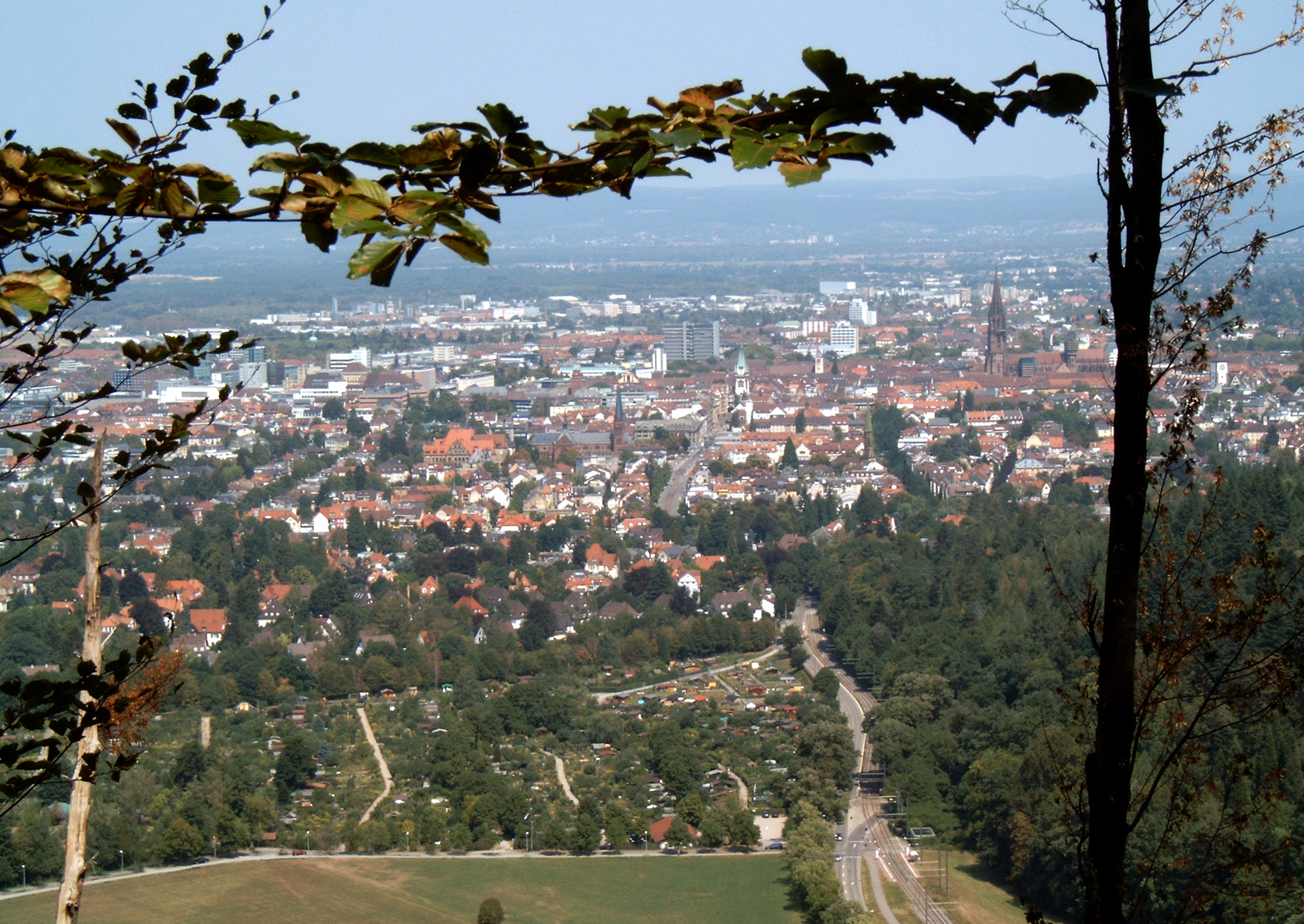 Blick vom Kreuzkopf auf Freiburg, vor der Altstadt rechts der Bildmitte die Mittelwiehre und links die Unterwiehre mit Johanneskirche, im Vordergrund vor dem Holbeinviertel die Kleingartenanlage Wonnhalde